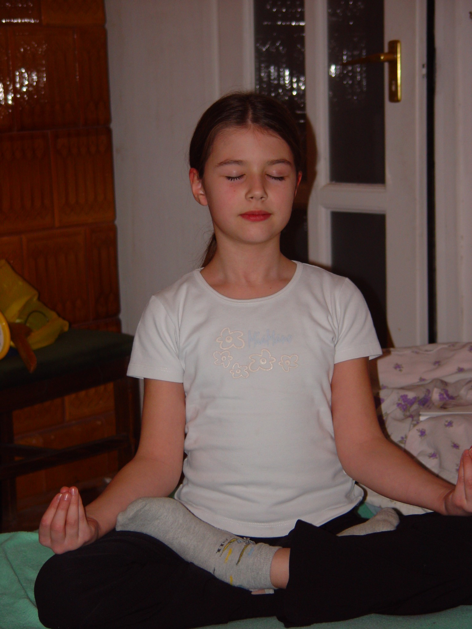 Meditáció